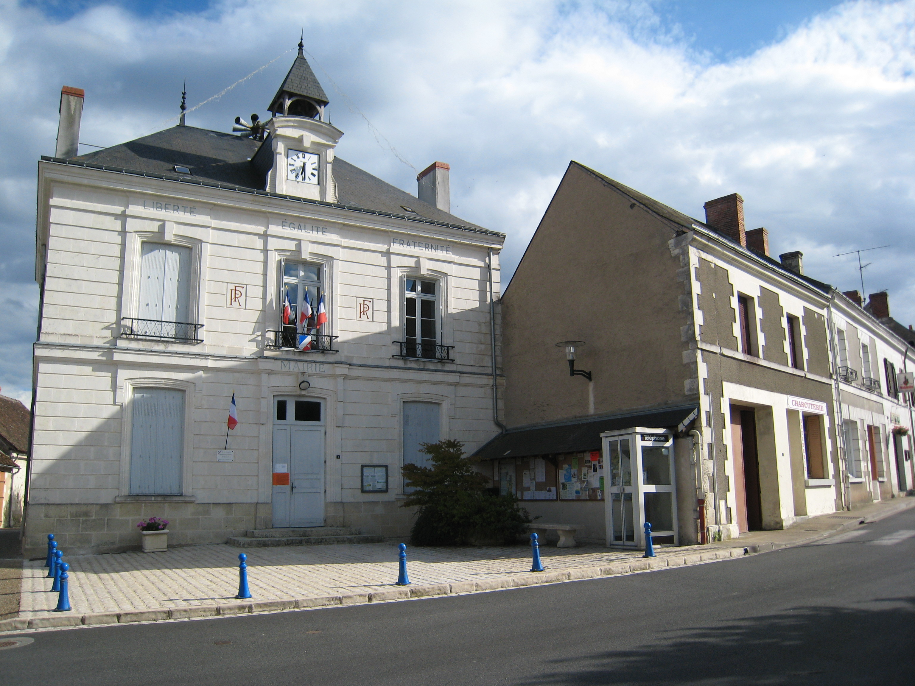 Hotel de ville de Charnizay, France